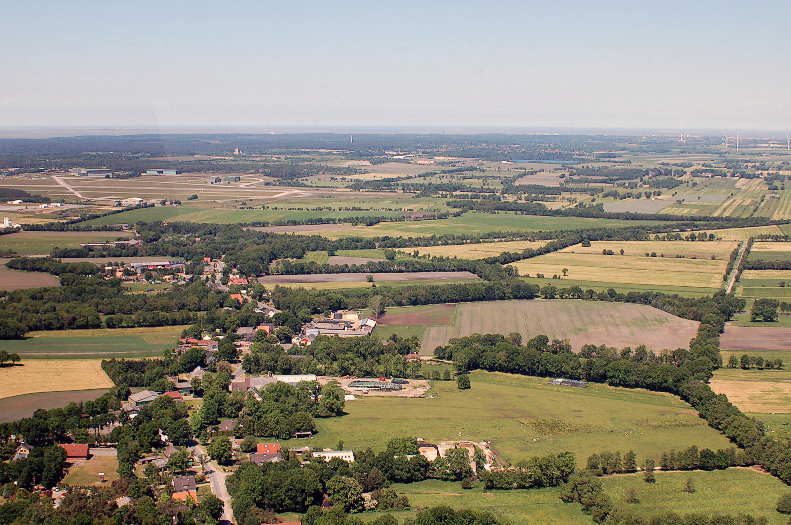 Wanhöden. Luftbilder von der Nordseeküste 2012-05